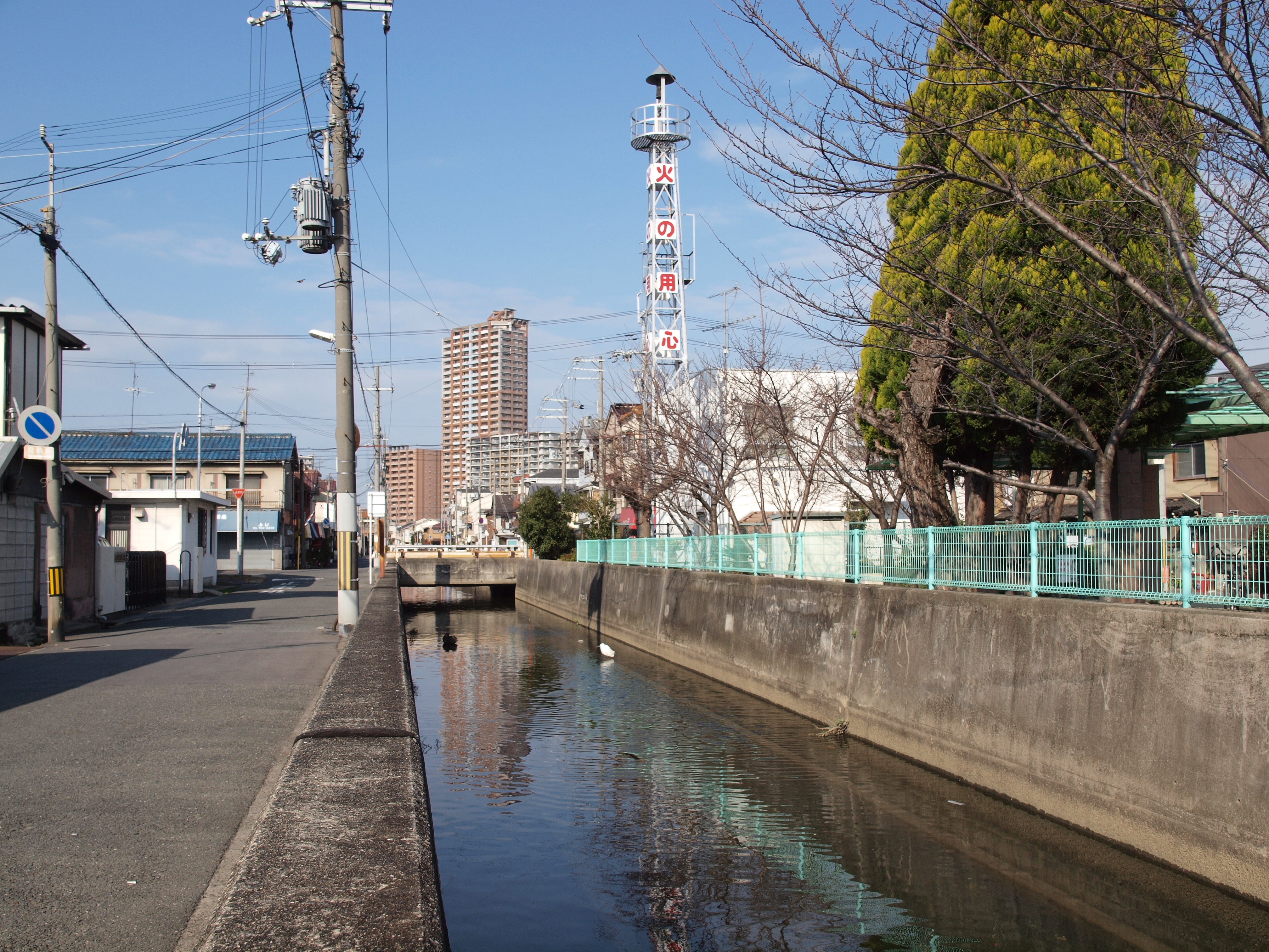 長瀬川（東大阪市森河内西） 2008年12月撮影。 機材：E-30 撮影者：Kansai explorer